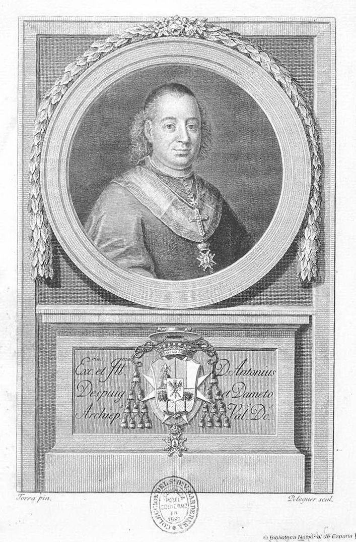 Retrat d'Antoni Despuig i Dameto (Palma de Mallorca, 30 de març de 1745 – Lucca, Regne d'Etrúria, 2 de maig de 1813) fet per Manuel Peleguer. Es troba a la Biblioteca Digital Hispànica. Gravat. 177 x 119 mm.